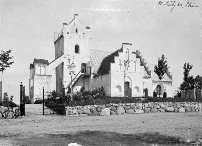 Bild av Stora Råby kyrka innan år 1909.